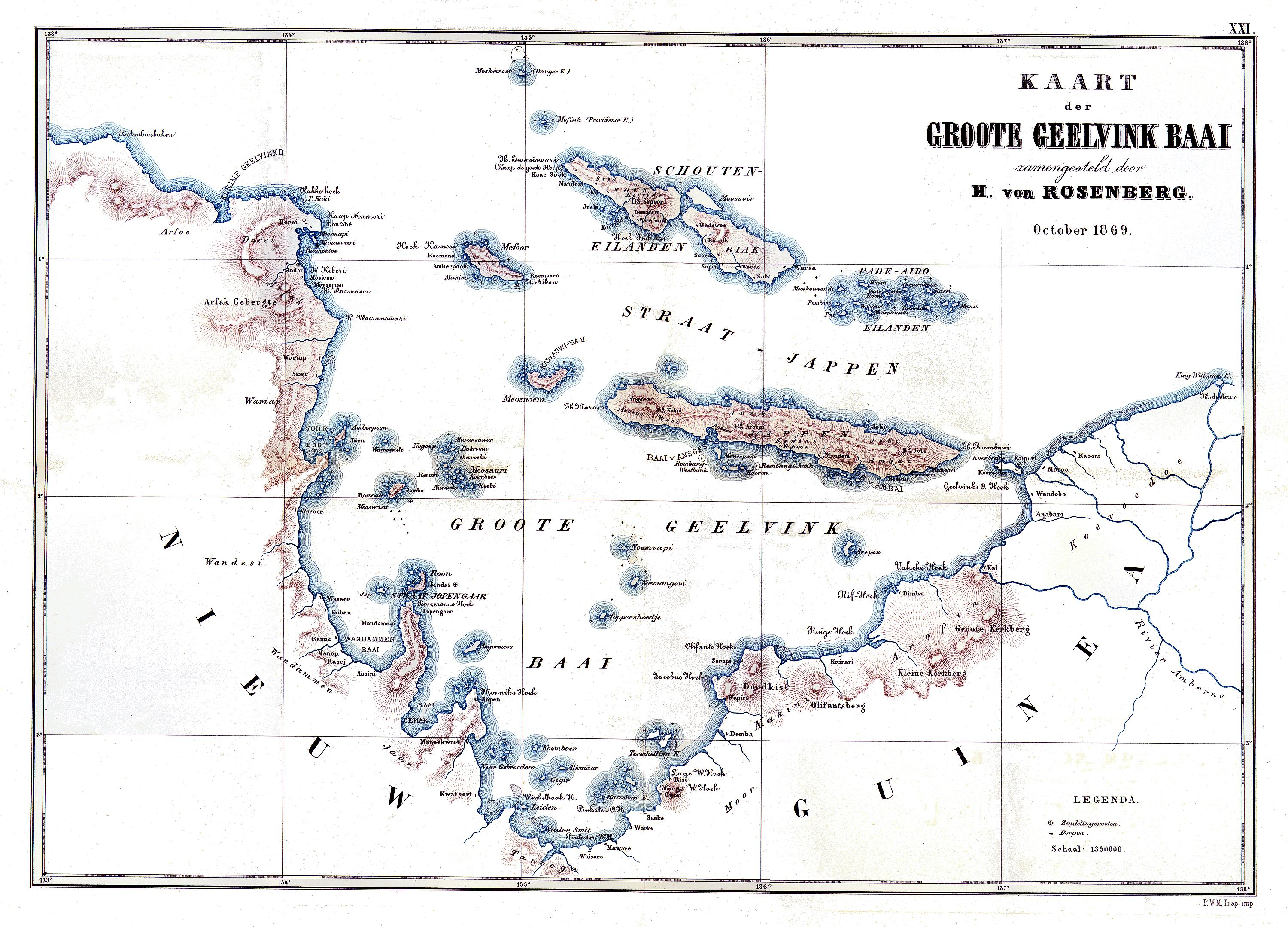 Hermann von Rosenberg's Karte der Geelvink-Bai (Neuguinea)